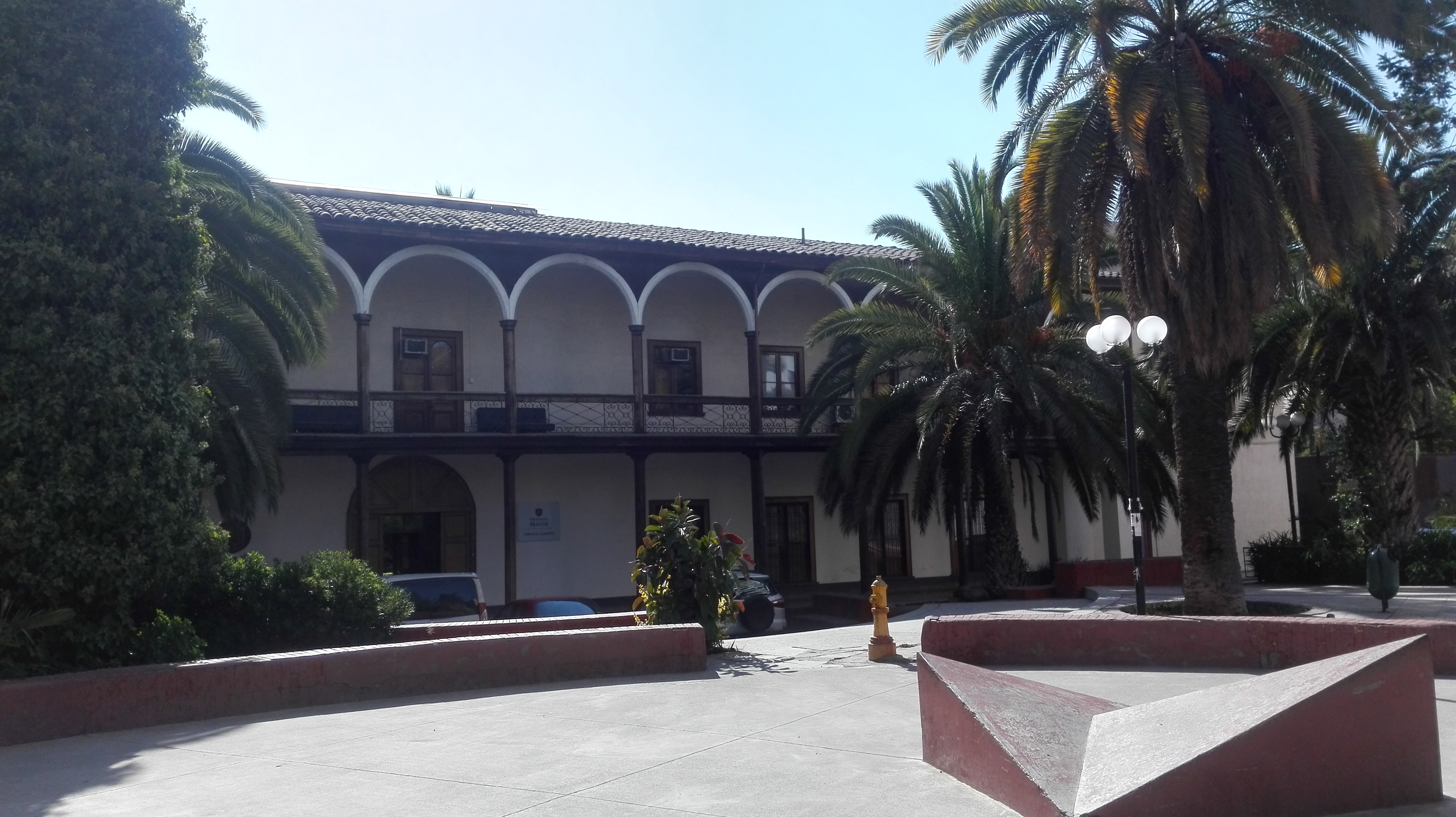 Campus El Claustro, Universidad Mayor, Santiago de Chile.